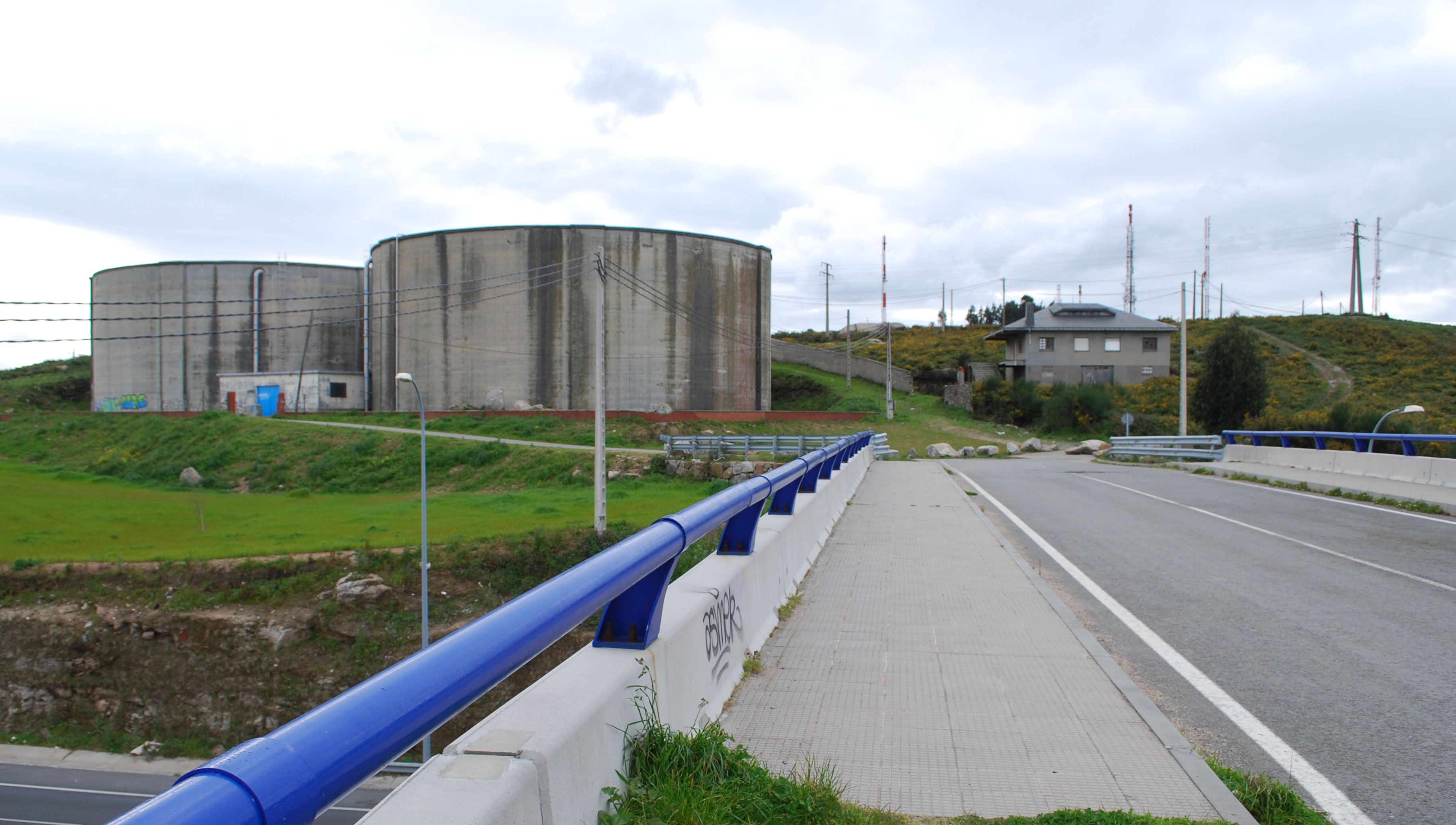 Penamoa Visma A Coruña Galiza